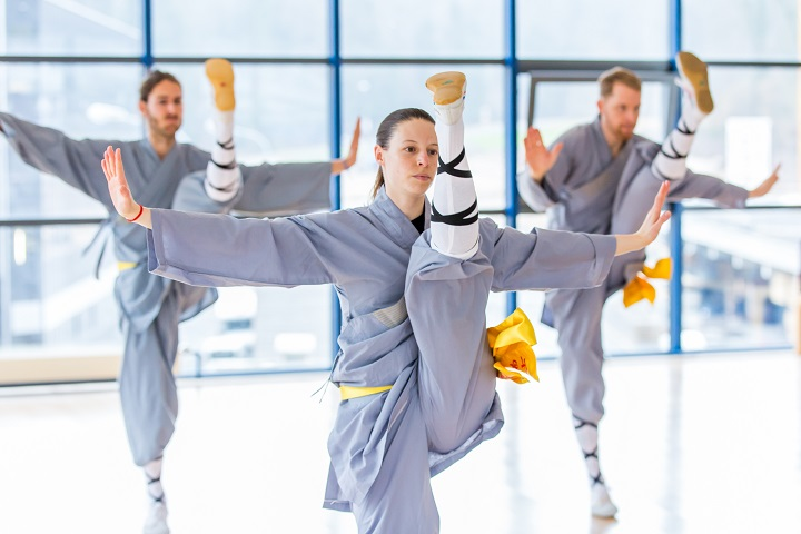 Studenten beim Training